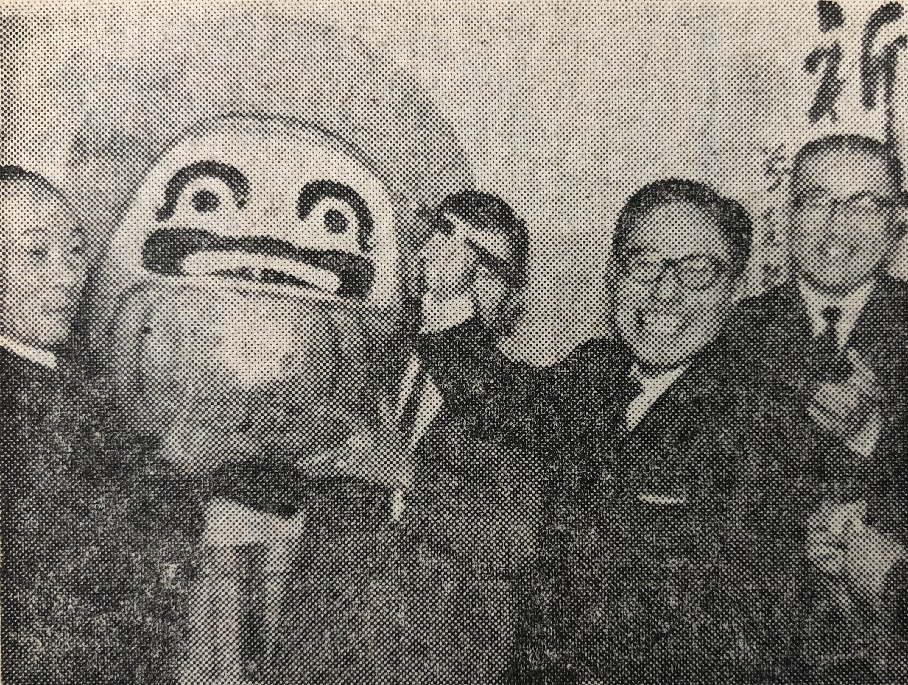 1969年12月の第32回衆議院議員総選挙で初当選した村田敬次郎